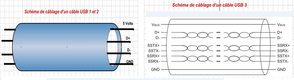 Schéma de câblage USB 1,2 et 3